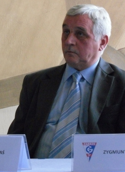 Piłkarz Jan Banaś. Zdjęcie zrobione podczas trzeciego dnia III Europejskiego Kongresu Gospodarczego w Katowicach.